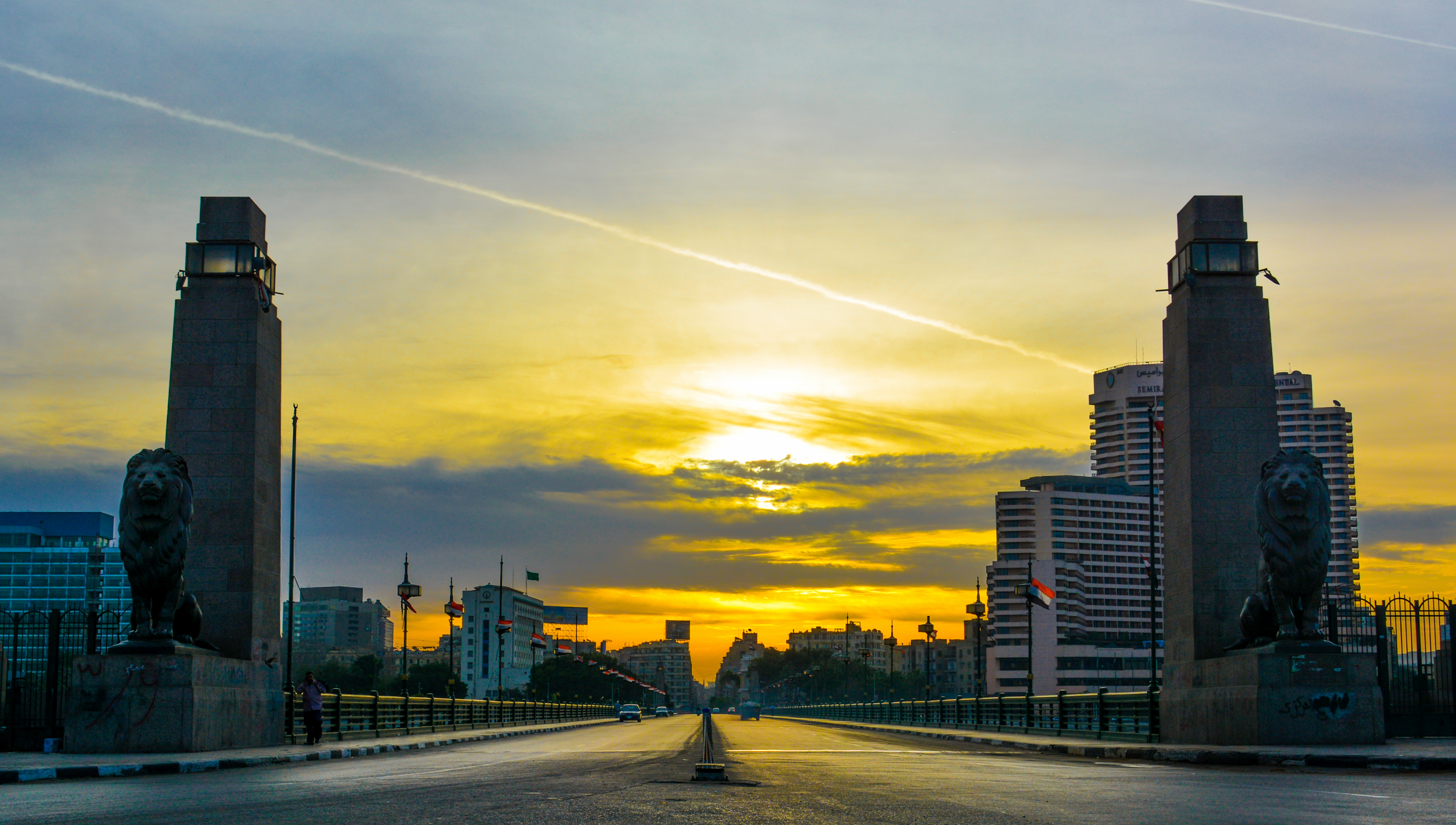 كوبرى قصر النيل مع شروق الشمس فوق القاهرة